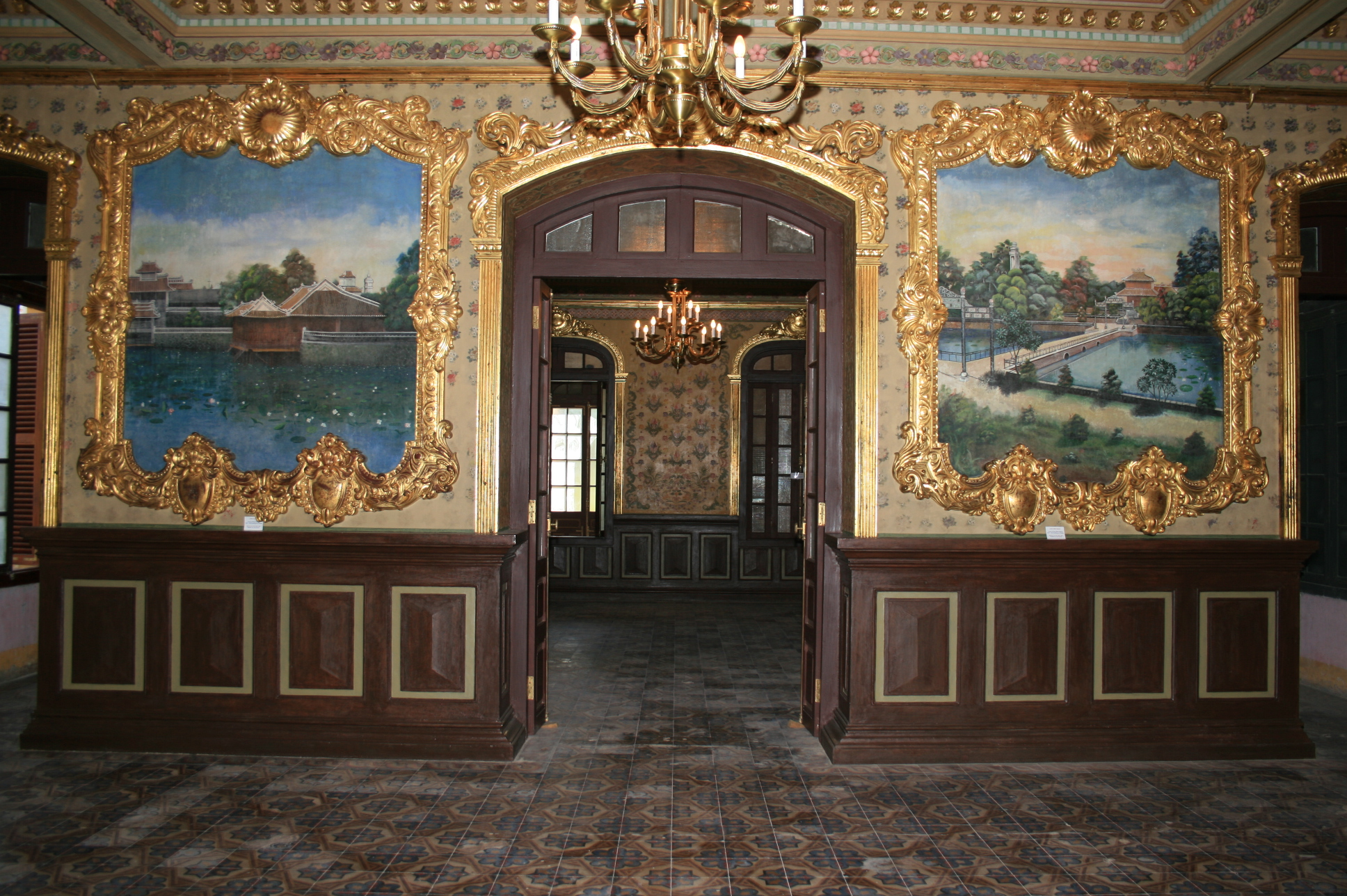 Tranh tường tại Cung An Định